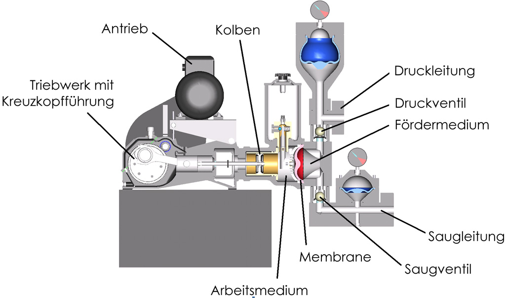 Kolbenmembranpumpe C) Emmerich